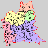 愛知県西春日井郡の町村制時点の町村。